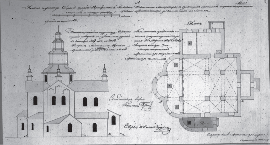 Беларуская (тарашкевіца): Невель (Nieviel), вуліца Замкавая (vulica Zamkavaja). Царква Сьвятога Спаса